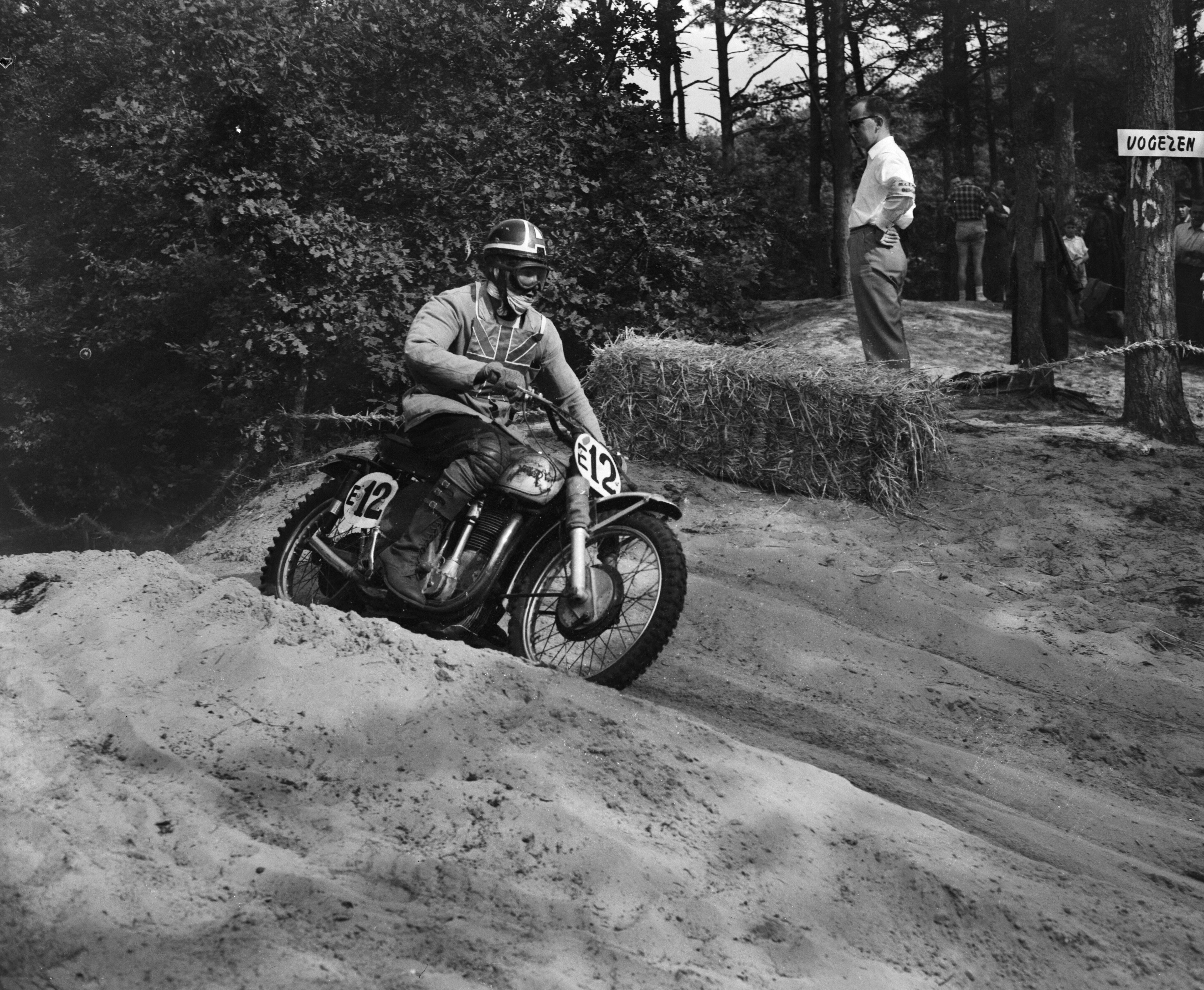 Collectie / Archief : Fotocollectie Anefo Reportage / Serie : [ onbekend ] Beschrijving : Norg Internationaal motorcross, L. Archer Datum : 4 september 1955 Locatie : Norg Trefwoorden : MOTORCROSSEN Persoonsnaam : Archer, L. Fotograaf : Pot, Harry / Anefo Auteursrechthebbende : Nationaal Archief Materiaalsoort : Negatief (zwart/wit) Nummer archiefinventaris : bekijk toegang 2.24.01.04 Bestanddeelnummer : 907-3074